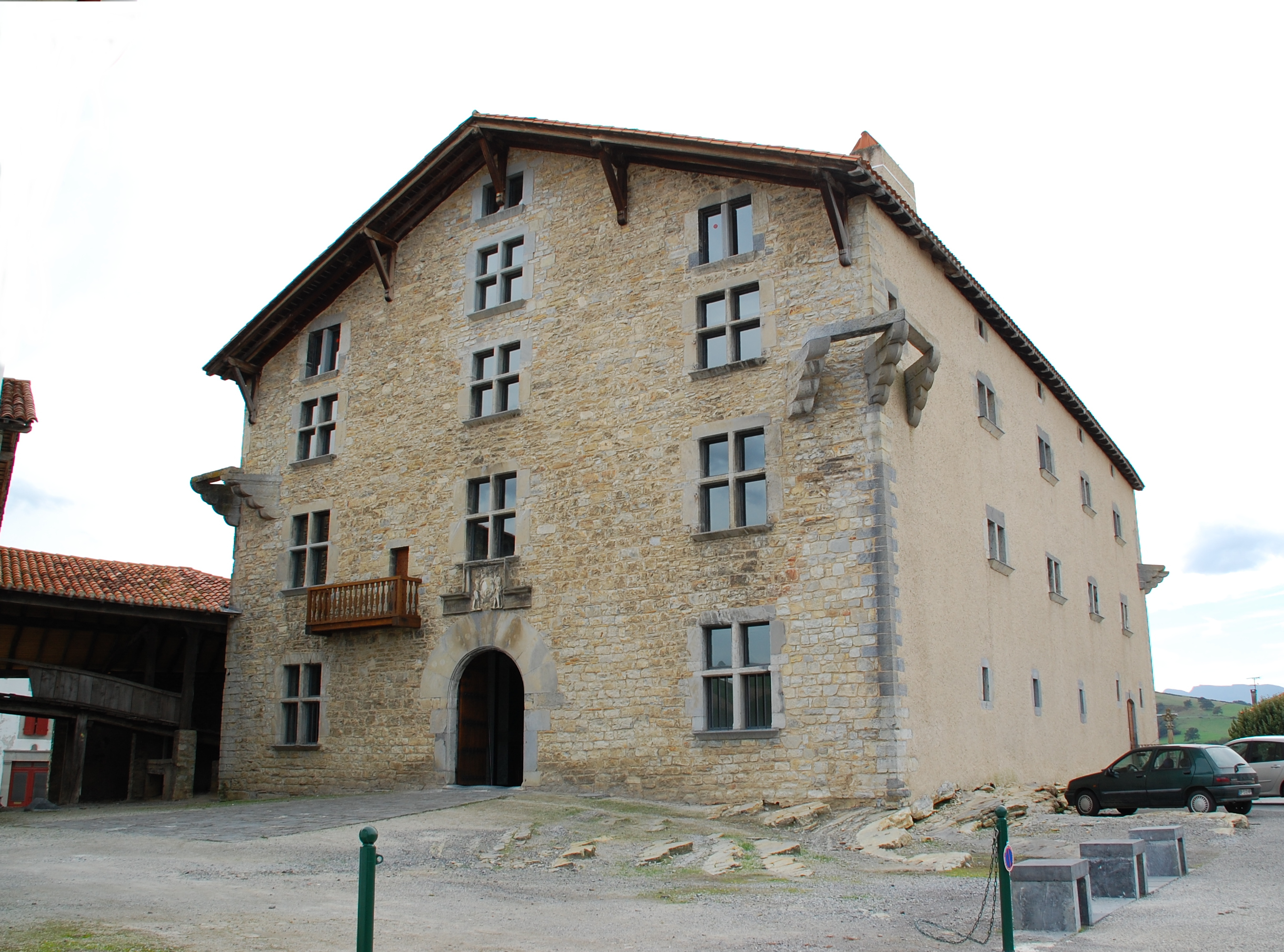 Commanderie Ospitalea.